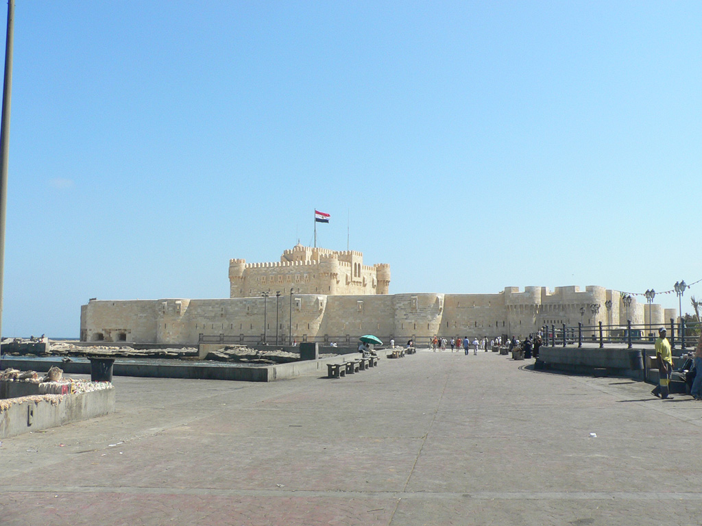 Qaitbay outside plaza